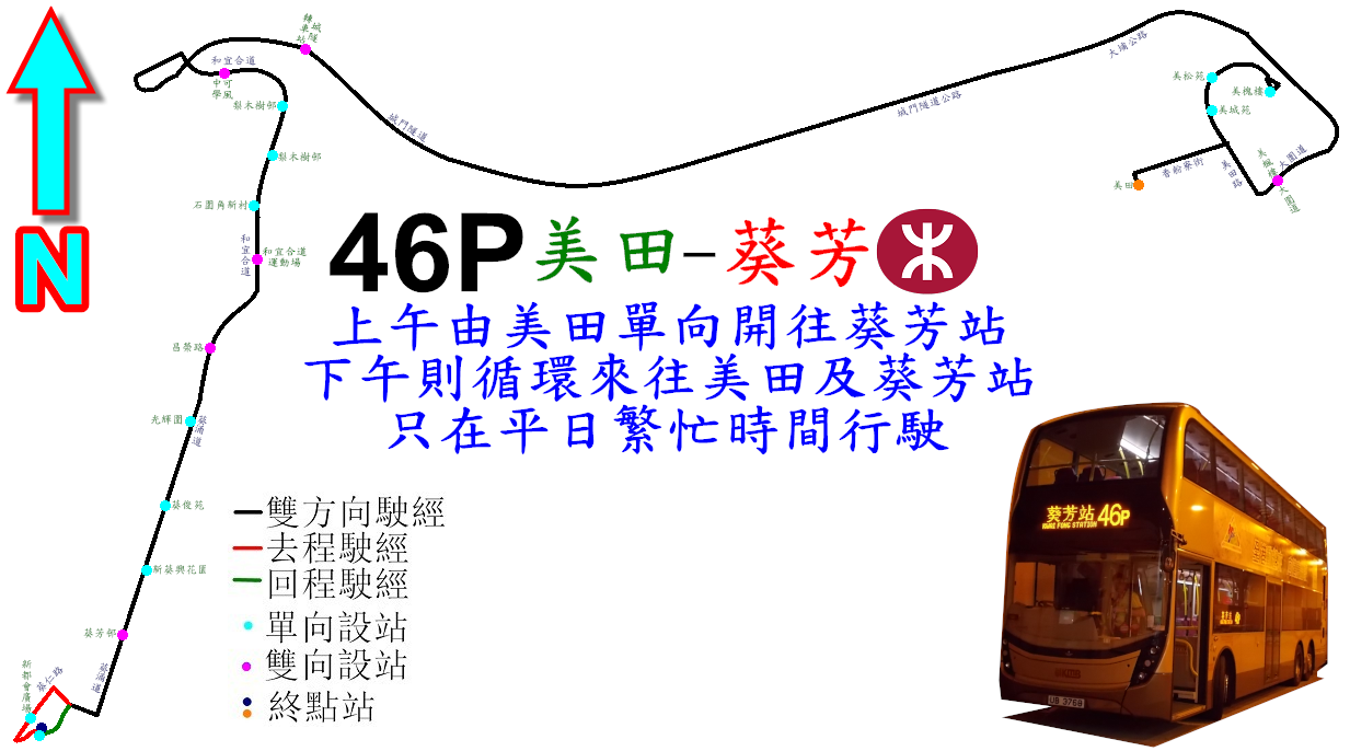 中文（香港）: 九巴46P線的走線圖